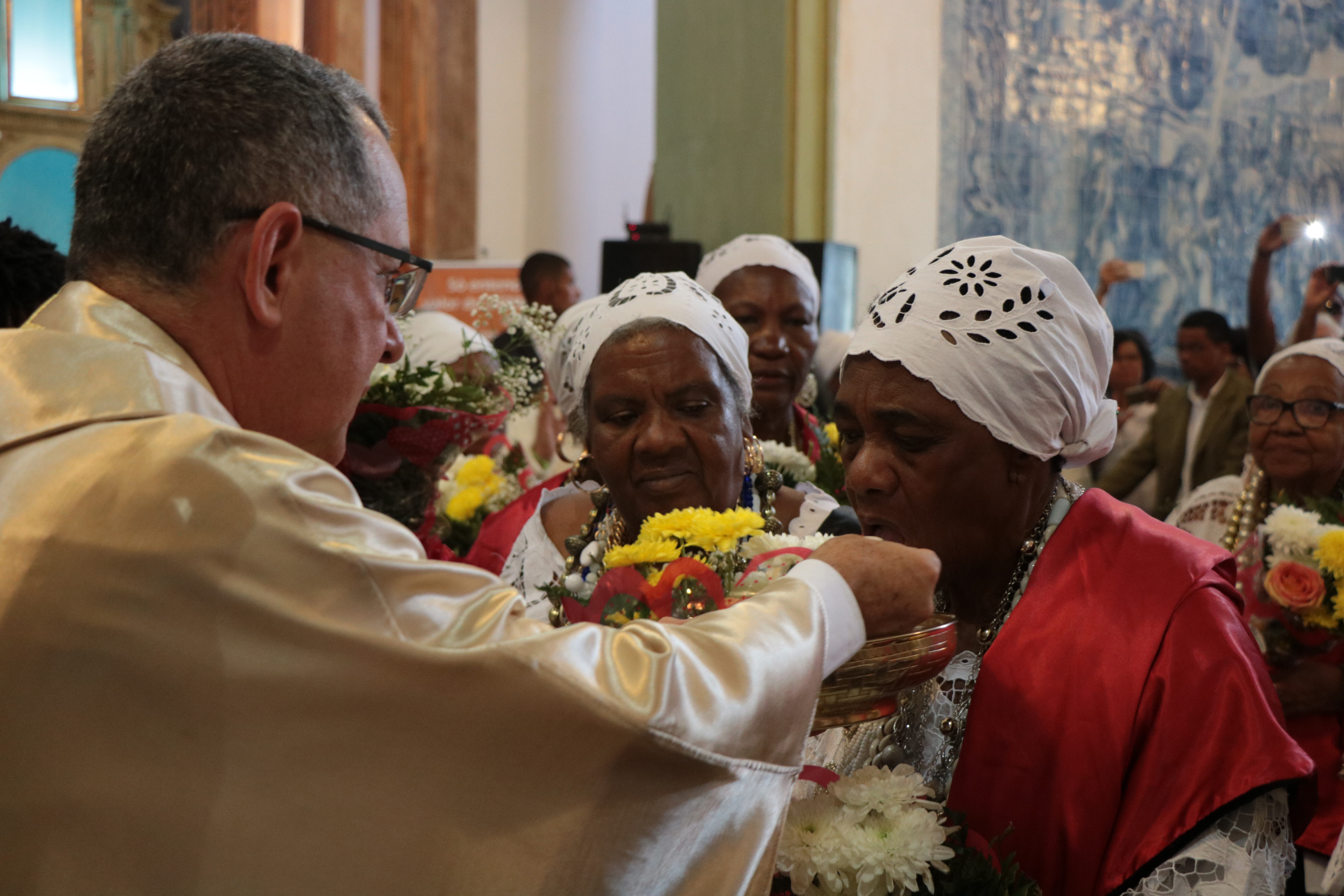 Festa da Boa Morte 2017, Cachoeira, Bahia.